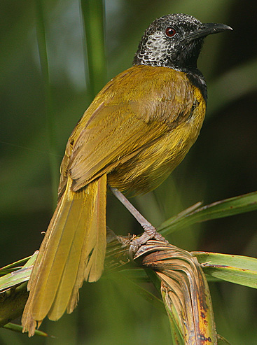 Image taken at Kotu, The Gambia. An adult male.